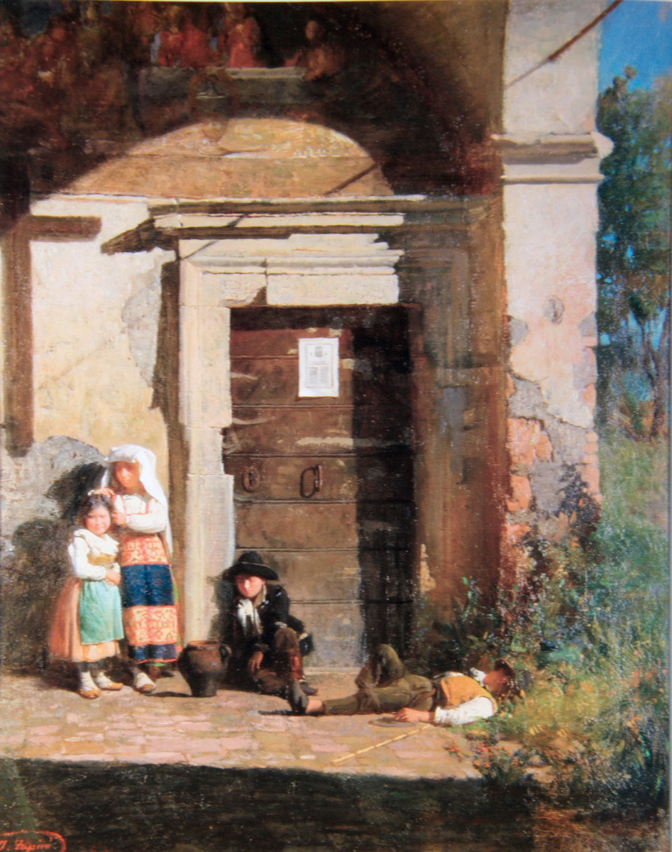 Obra de Josep Tapiró i Baró del període a Roma